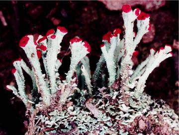 Cladonia cristatella